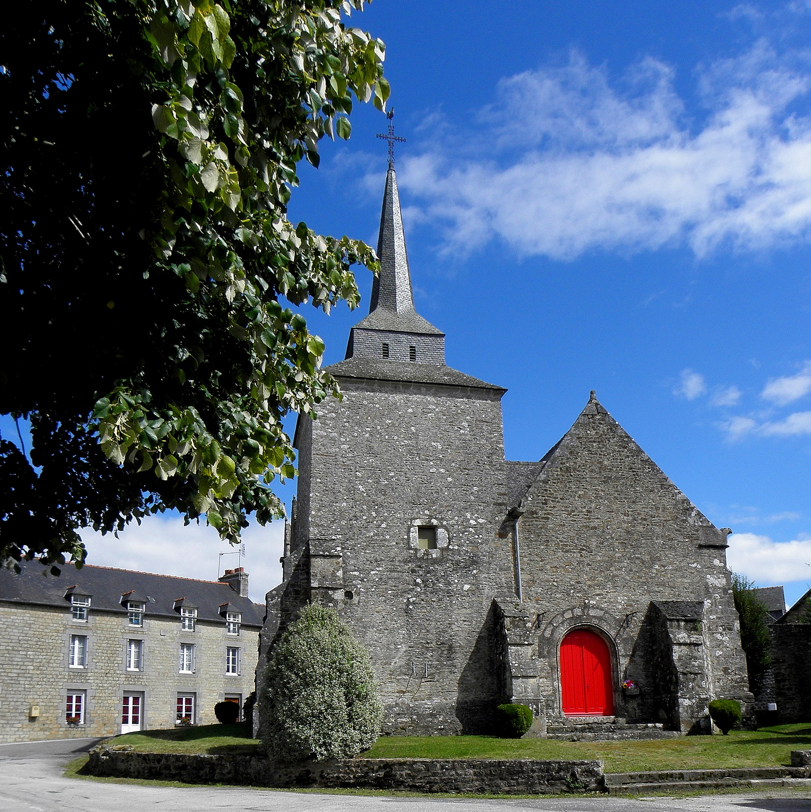 Chapelle Saint-Lubin de Plémet (22). Façade occidentale.